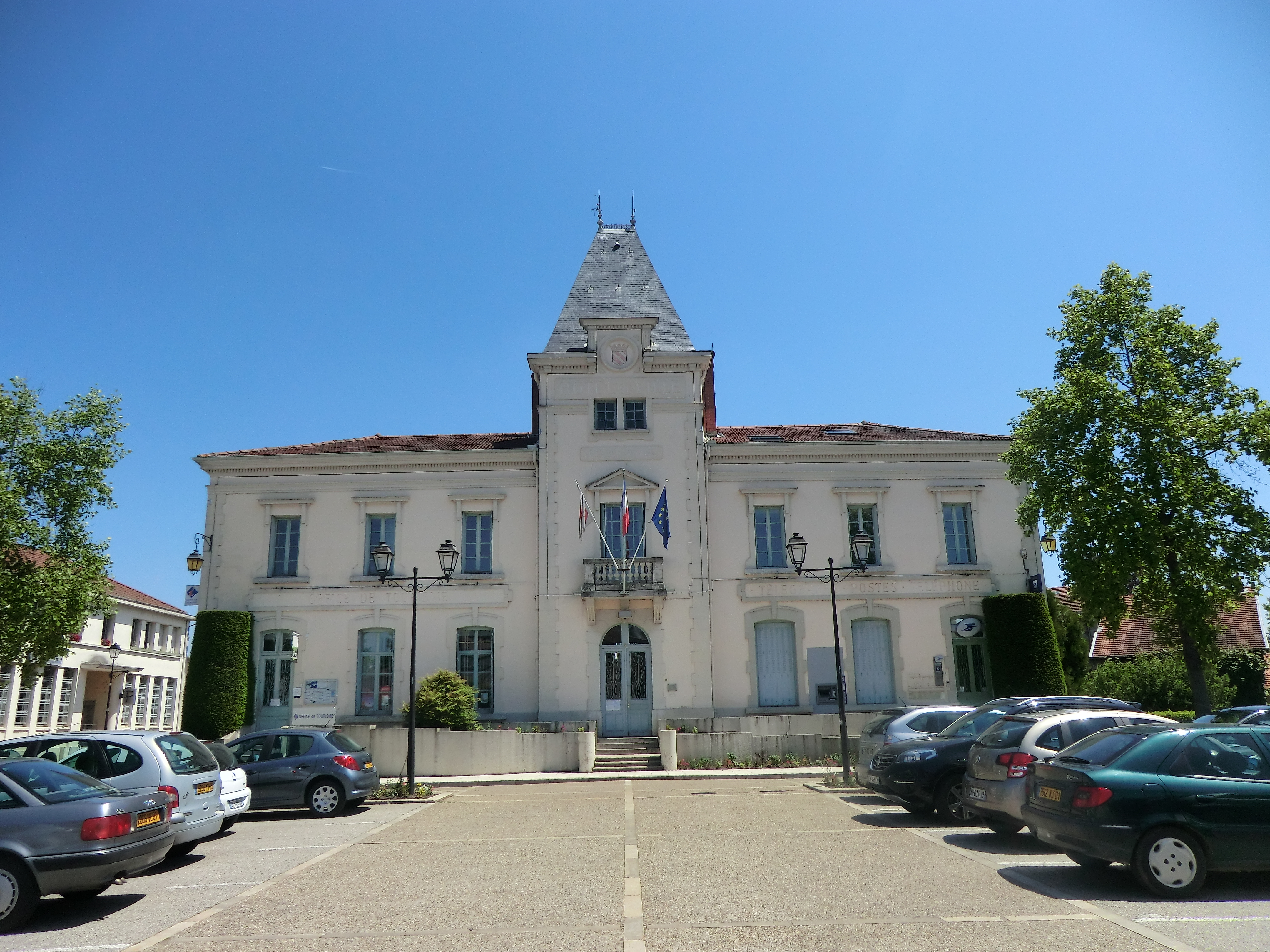 Mairie de Villars-les-Dombes.